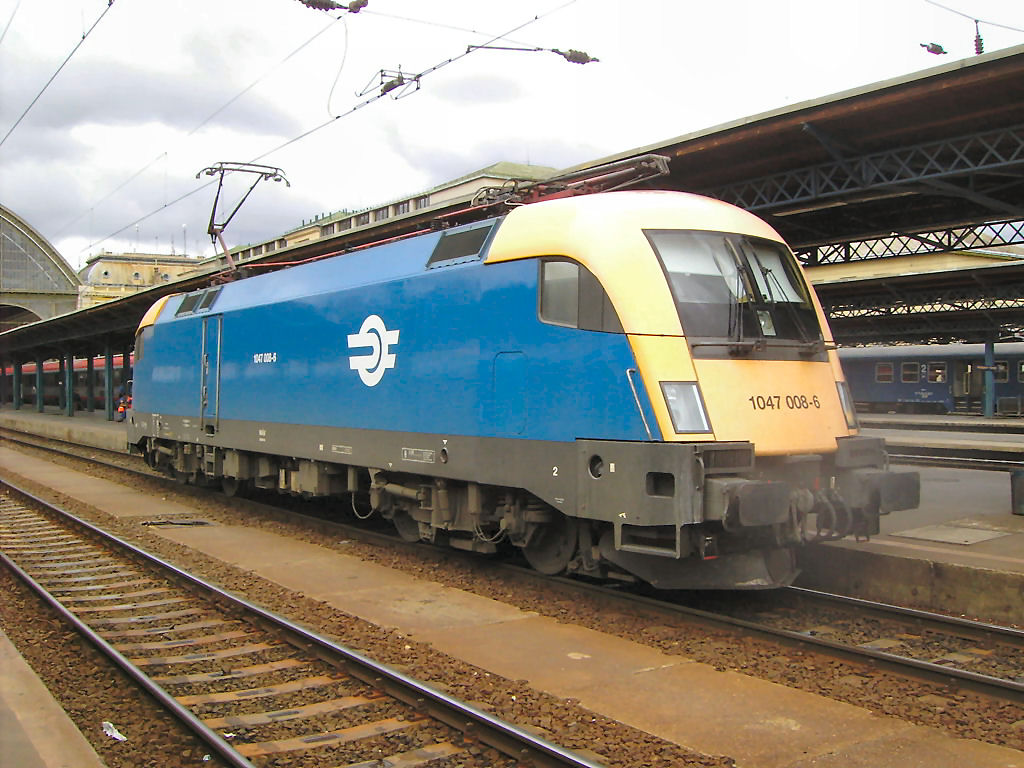 A MÁV 1047-es sorozatú mozdonya